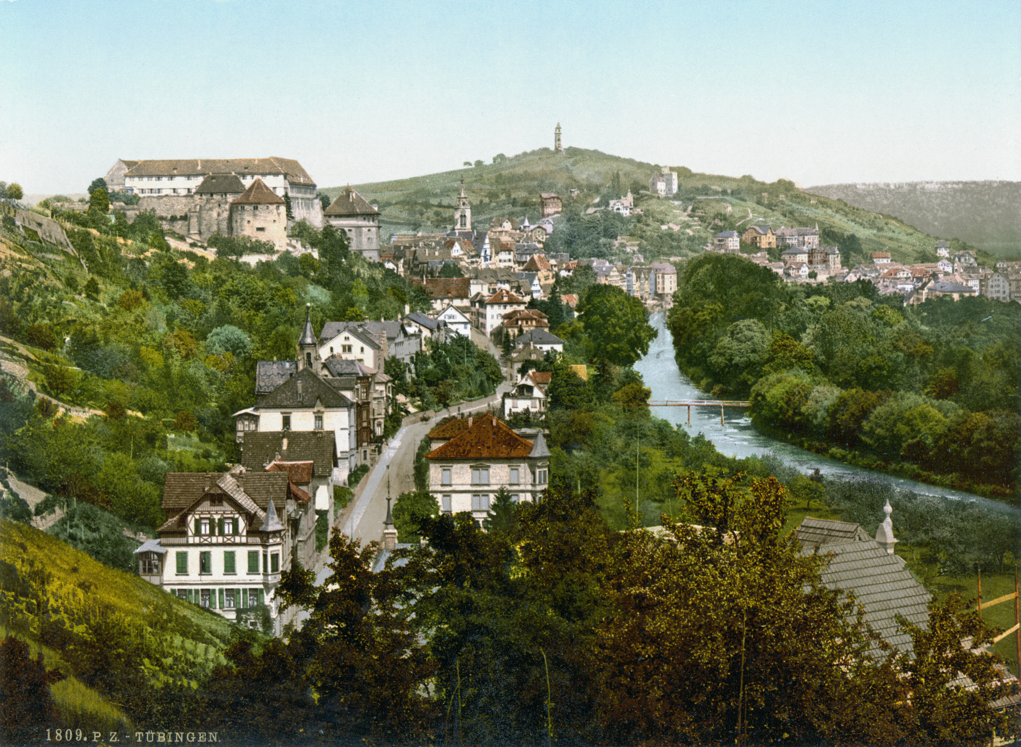 Tübingen von Westen, spätestens 1895. Auf dem Neckar ist der Hirschauer Steg sichtbar, der 1896 durch die Alleenbrücke ersetzt wurde.